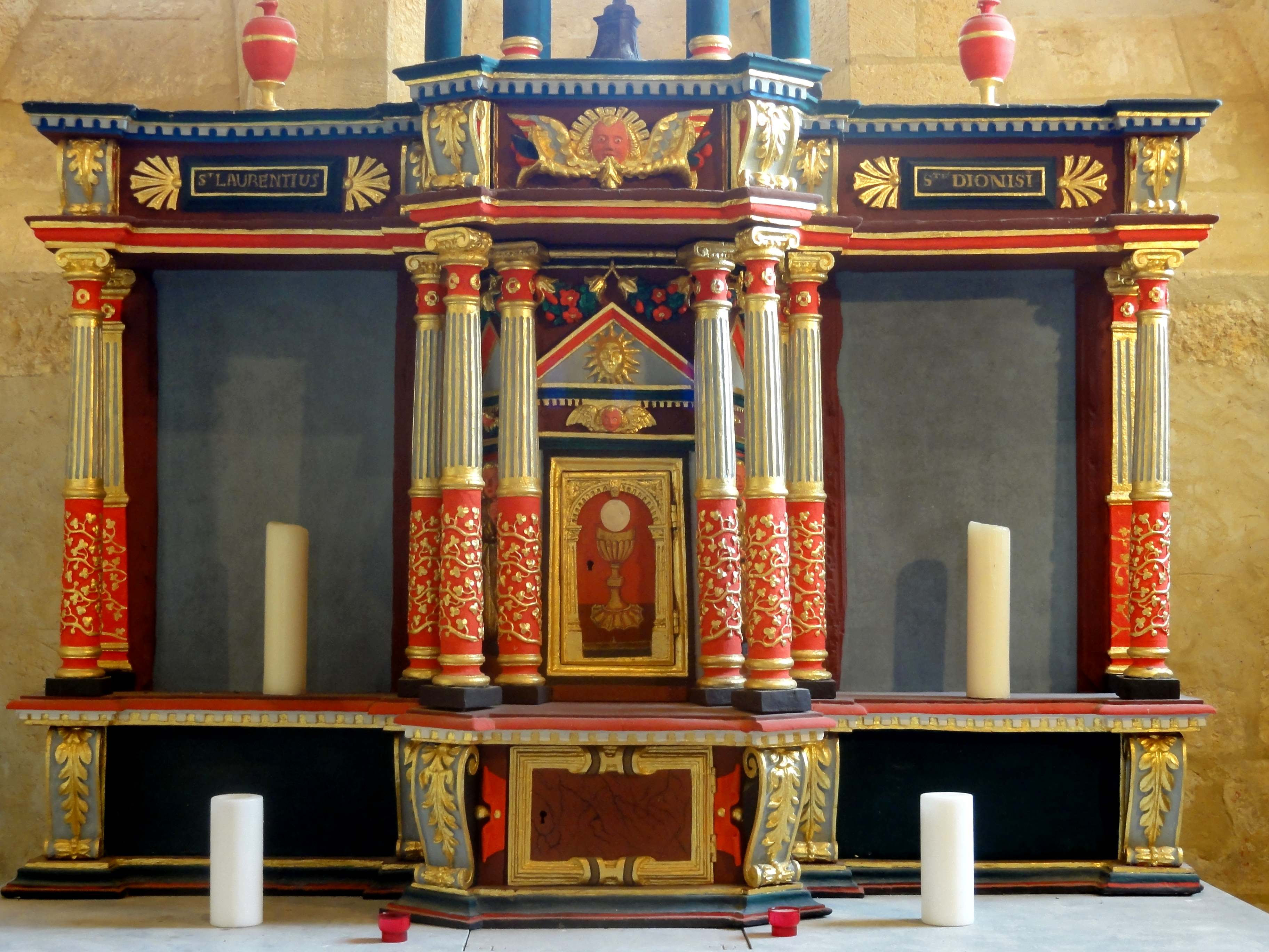 Retable majeur.